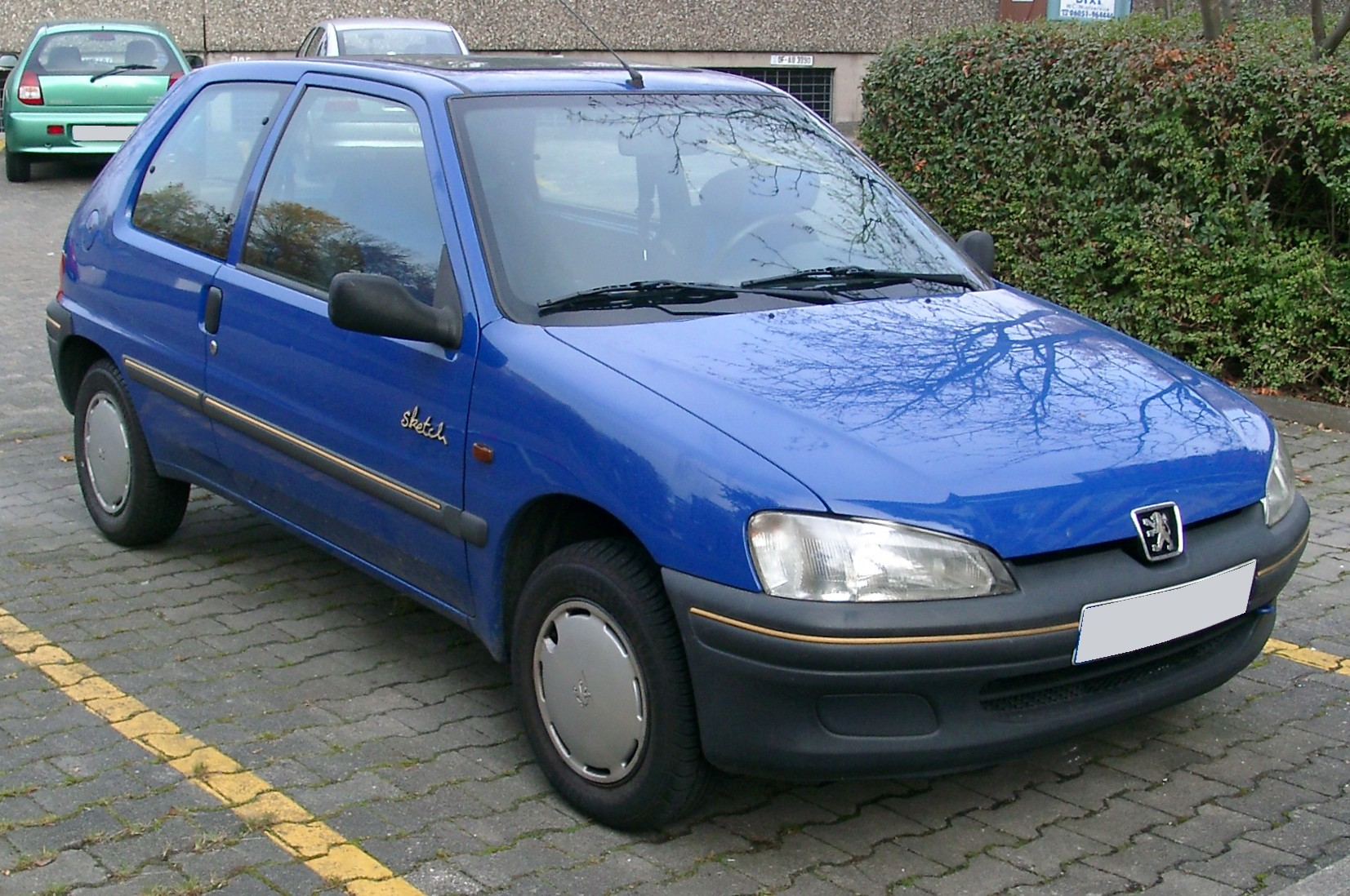 Peugeot 106